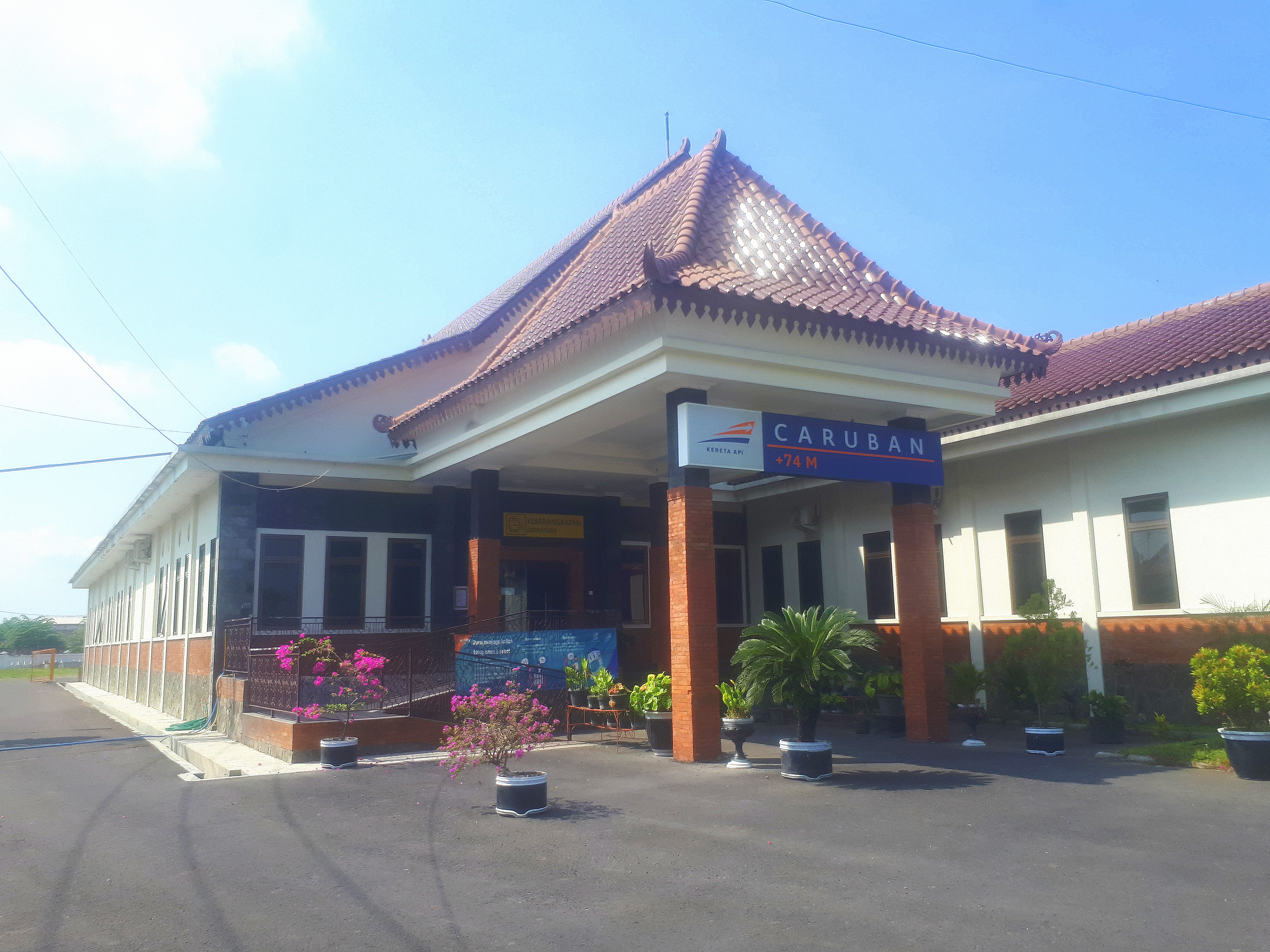 Tampak depan bangunan baru Stasiun Caruban, 2020